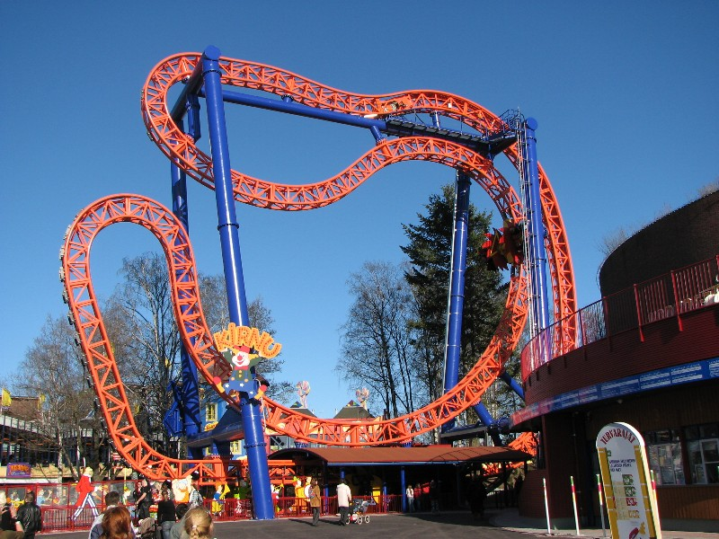 Kirnu roller coaster in Linnanmäki amusement park in Finland